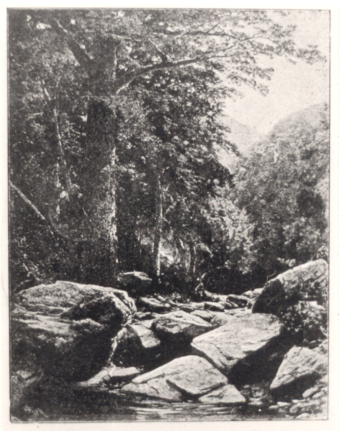 Ernst von Bernuth - Aus dem Morgenbachthal unterhalb von Bingen, Hozstich nach Gemälde